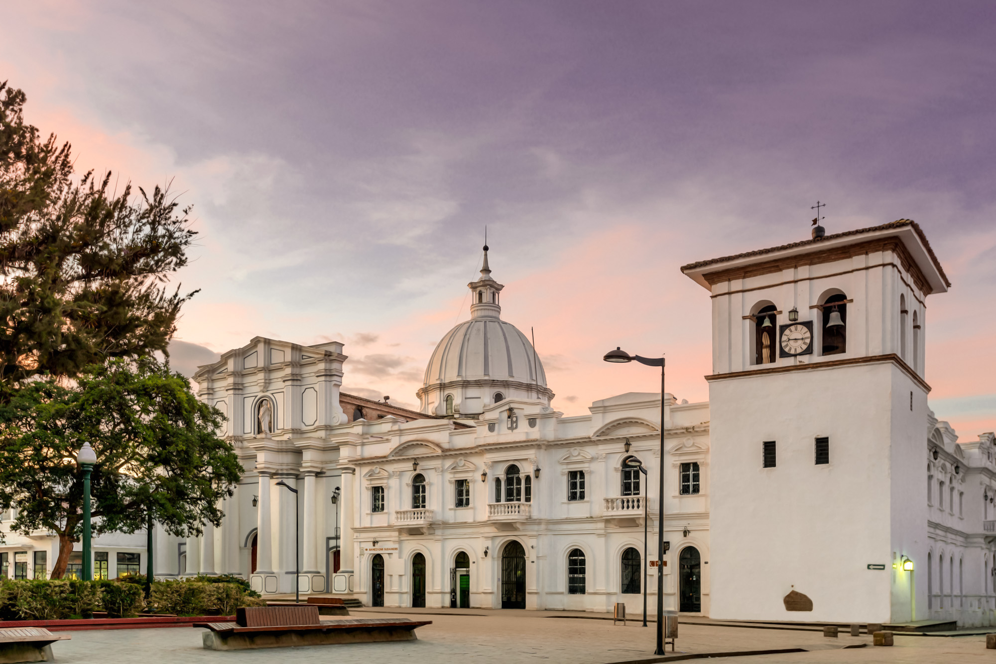 torre del reloj junto a la catedral de la ciudad